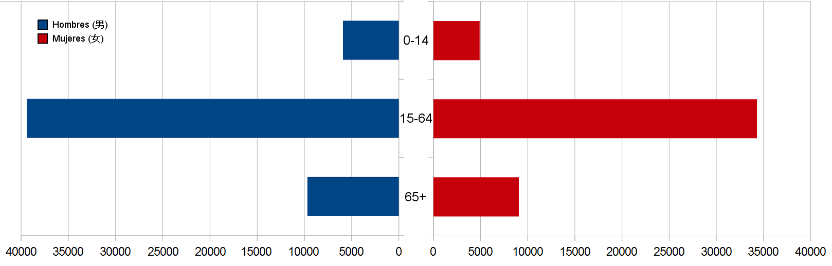 Grafica de población por edad y sexo de Yunhe, Zhejiang